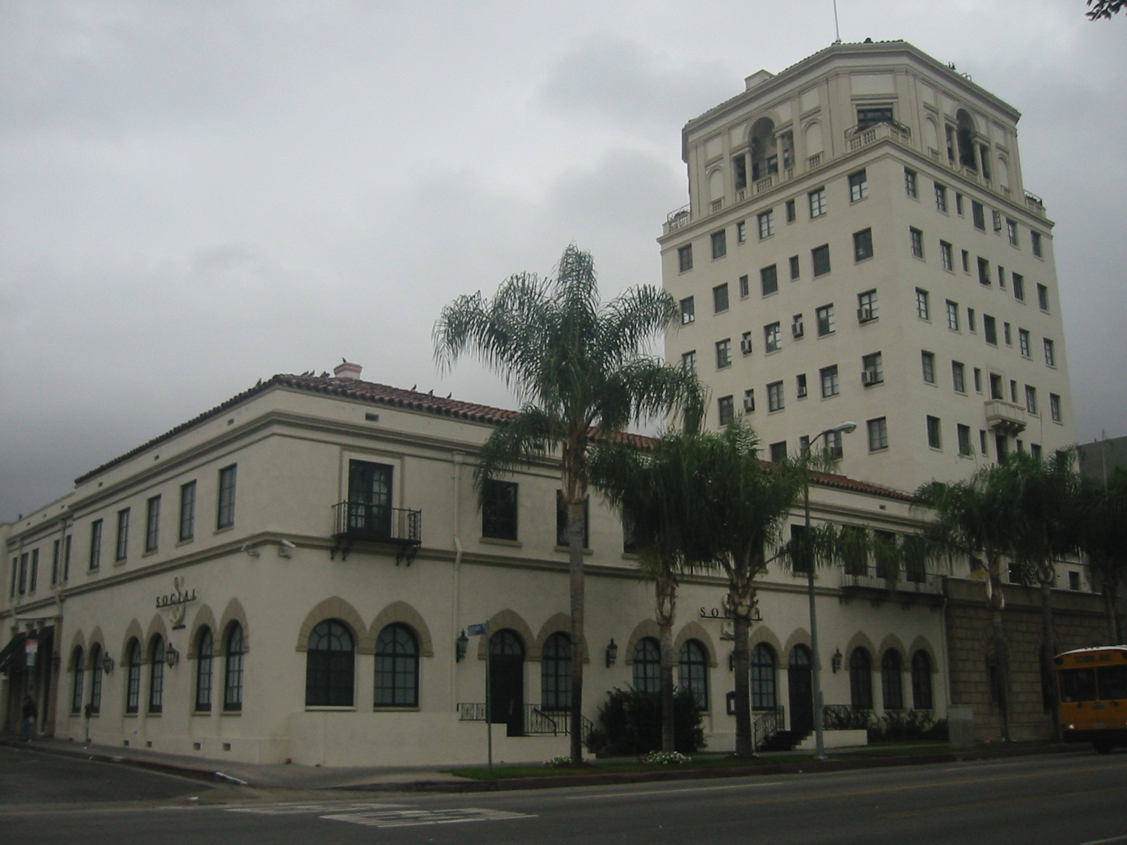 Hollywood Athletic Club